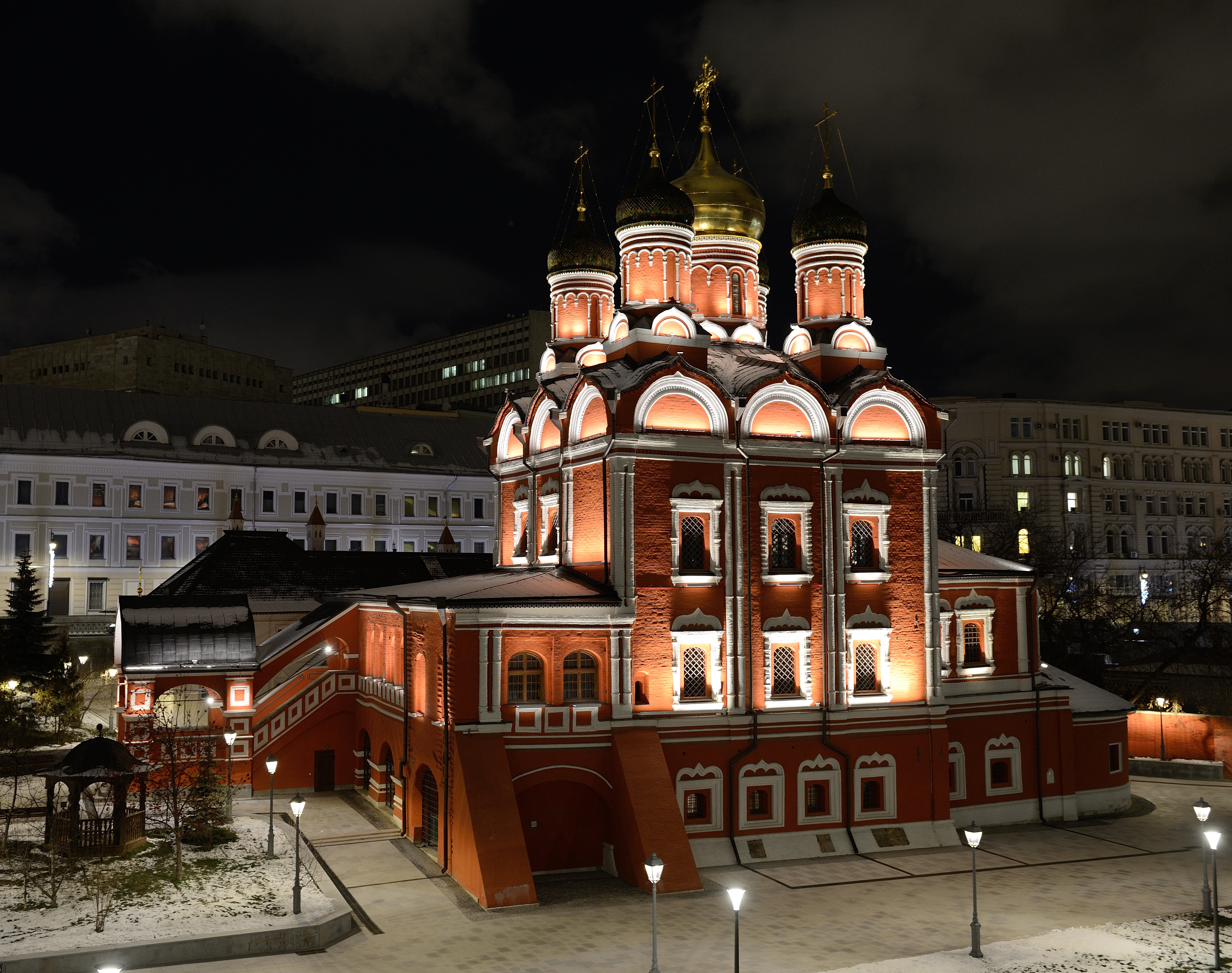 Знаменский собор, г.Москва, Зарядье, декабрь 2017г.